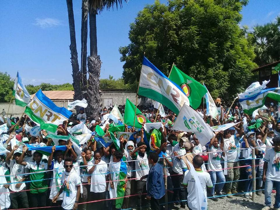 Wahlkampfveranstaltung der AMP auf Atauro, Oecusse, Osttimor